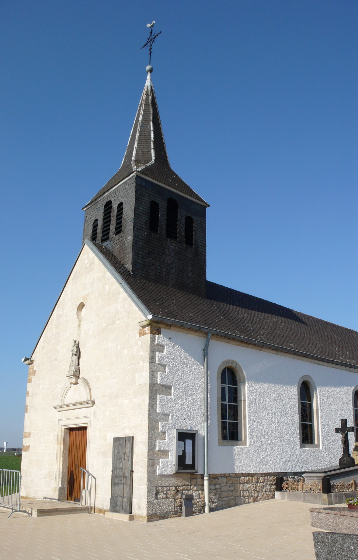 D'Kapell vun Éileng